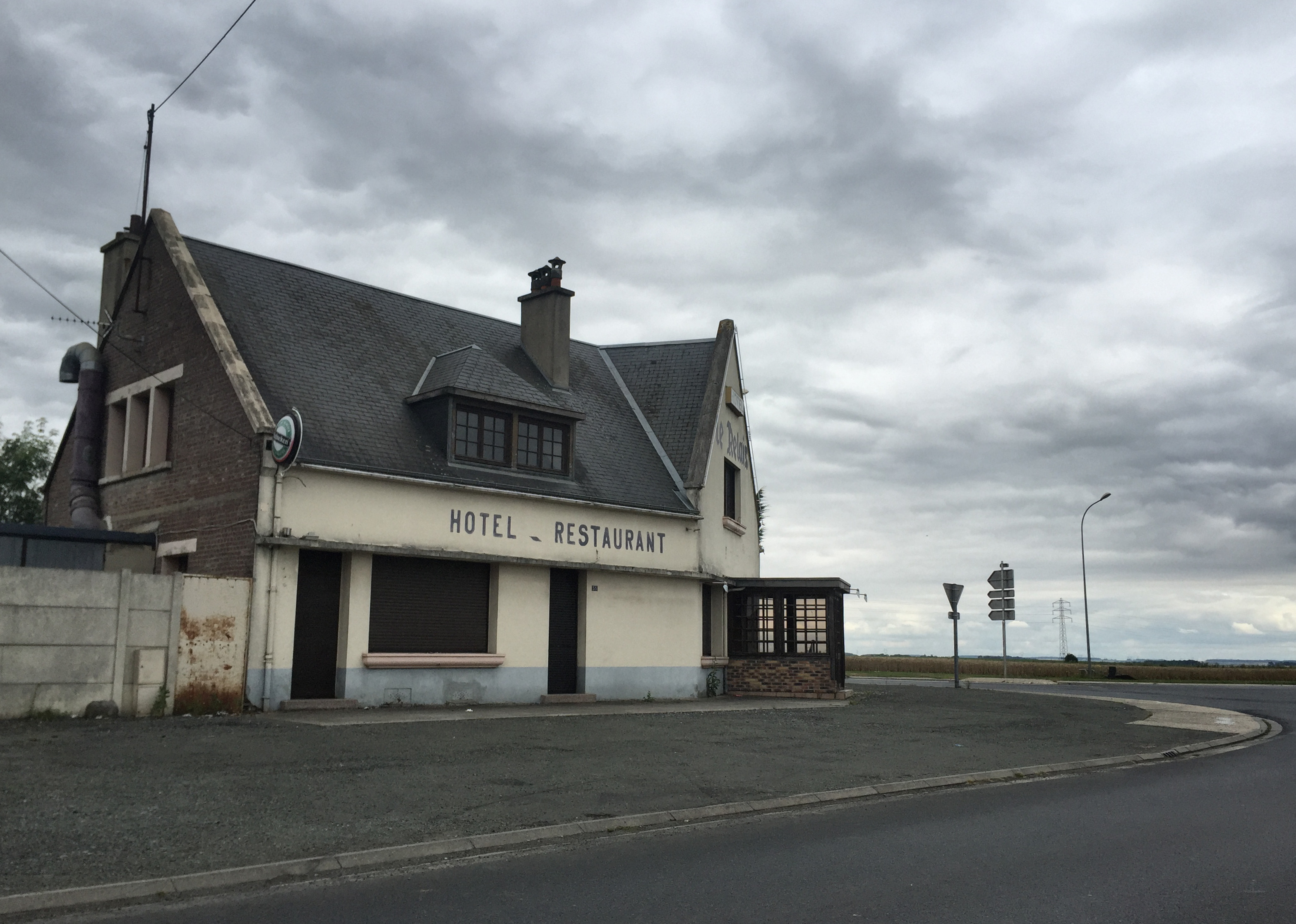 Een restaurant aan de voormalige Route Nationale 17 in Frankrijk